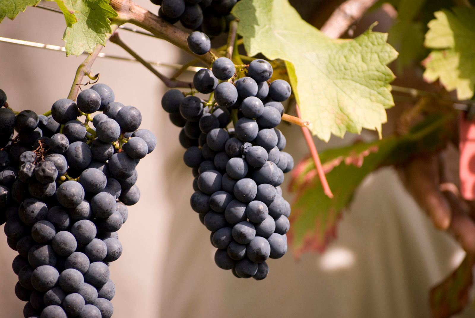 Traube Cabernet Cortis Züchtung Freiburg im Breisgau Dr. Jörger